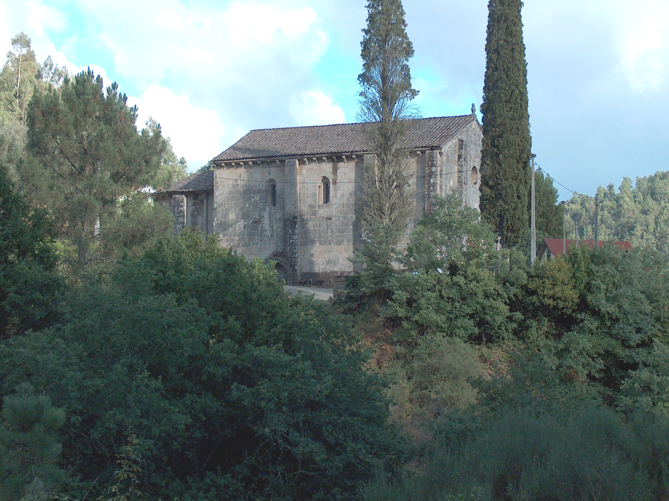 Igreja de Nossa Senhora da Conceição (Ermida). Ermida de Paiva, Castro Daire, Portugal.